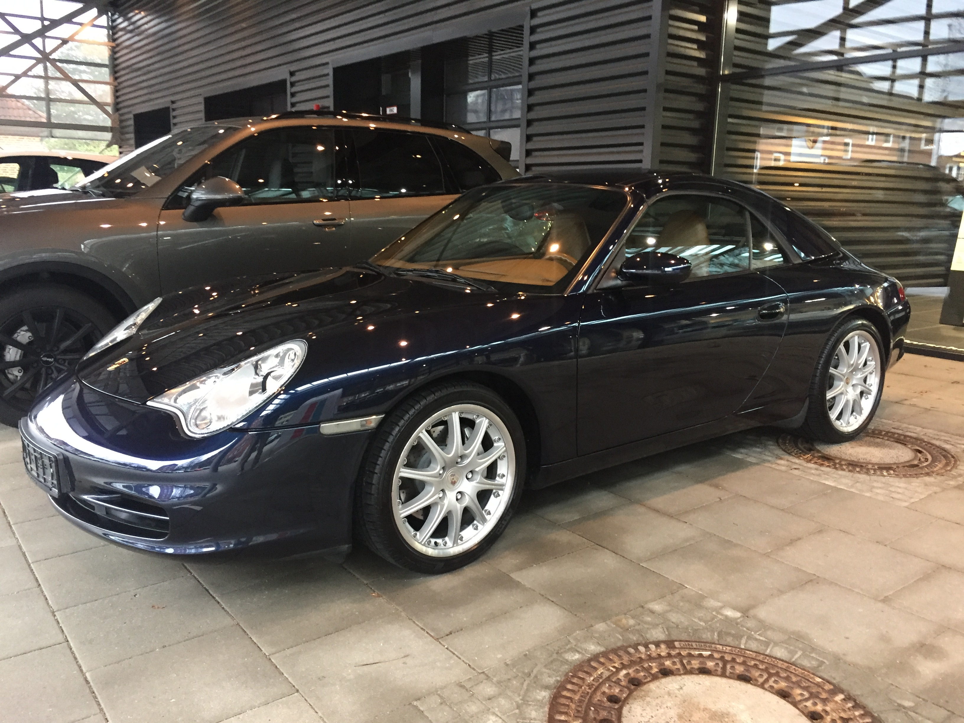 Porsche 996 Cabrio mit Hardtop